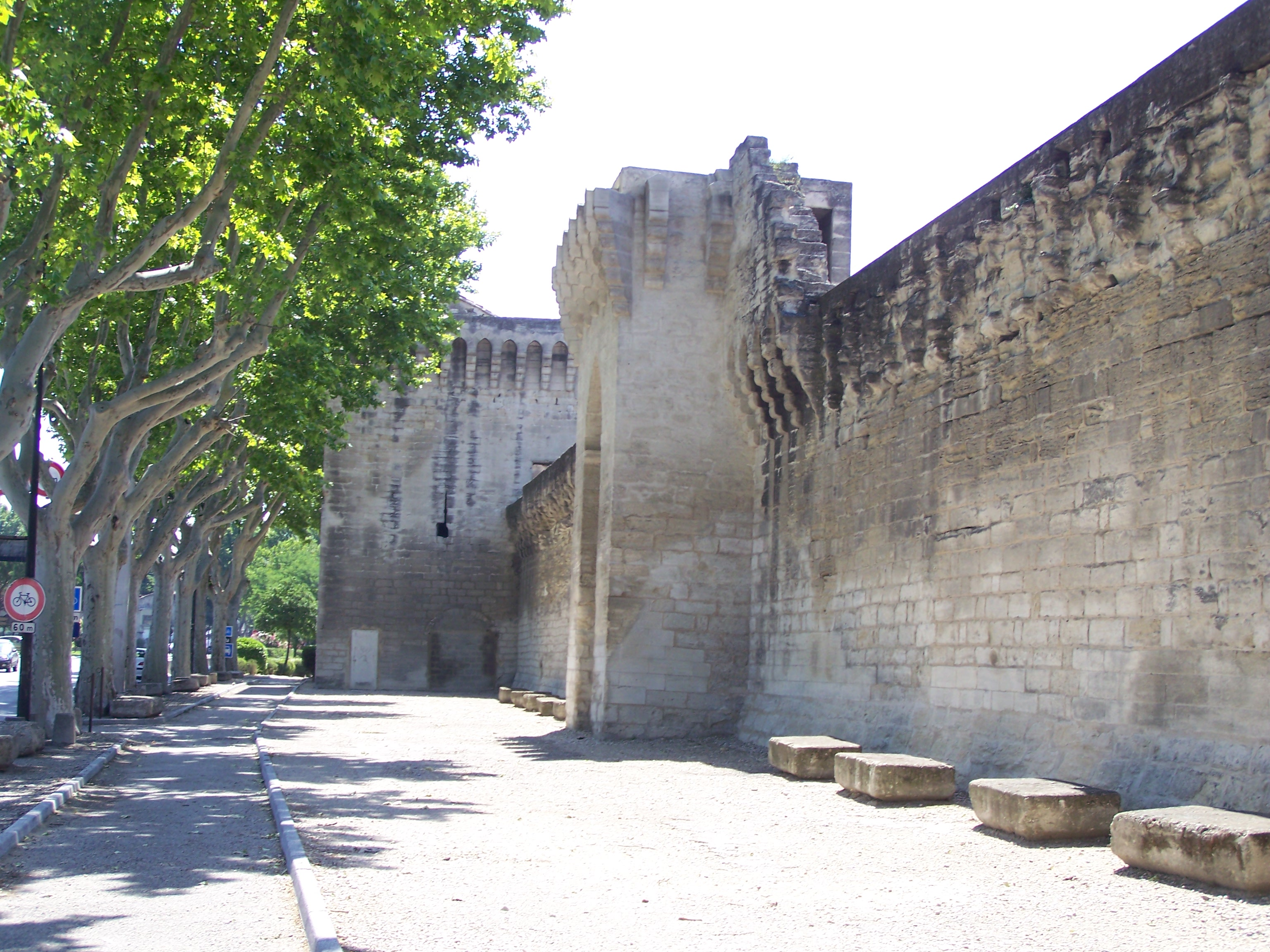 Avignon Stadtmauer